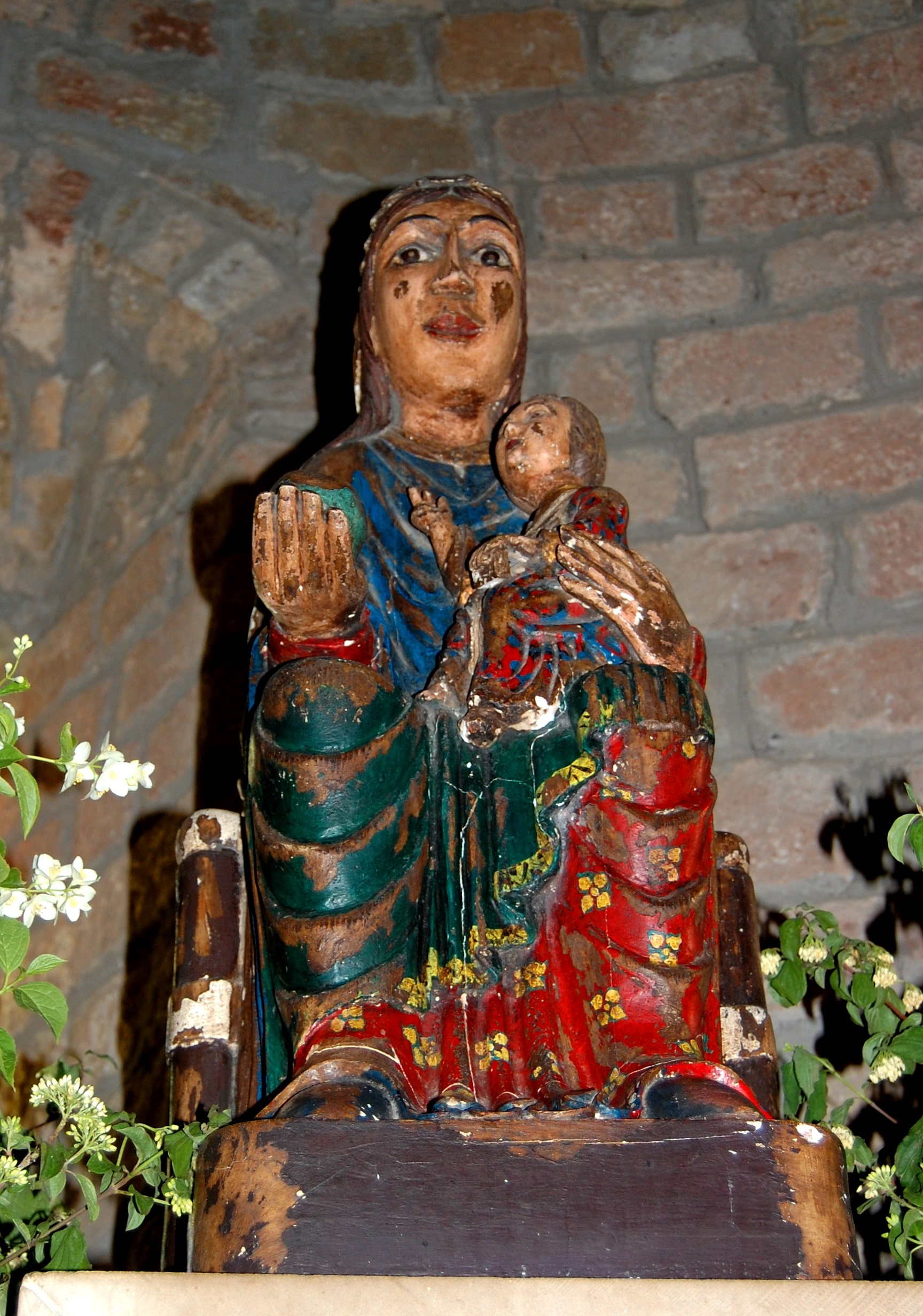 Santa Maria de l'Aguda (Torà)